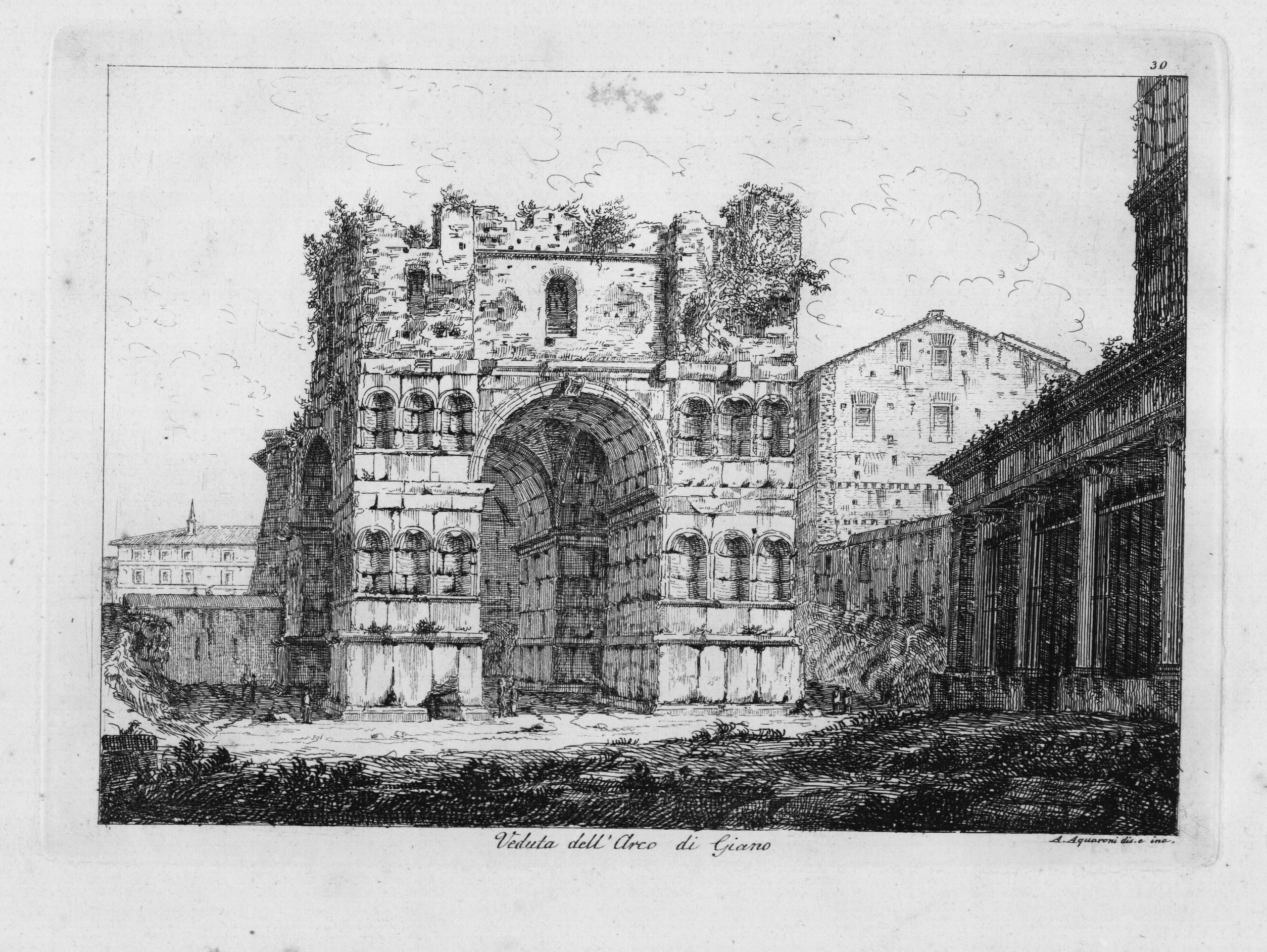 Alter Stich des Janusbogens in Rom, rechts im Bild: Portal von St. Giovanni di Velabro. Privatbesitz. 1700s 2007.